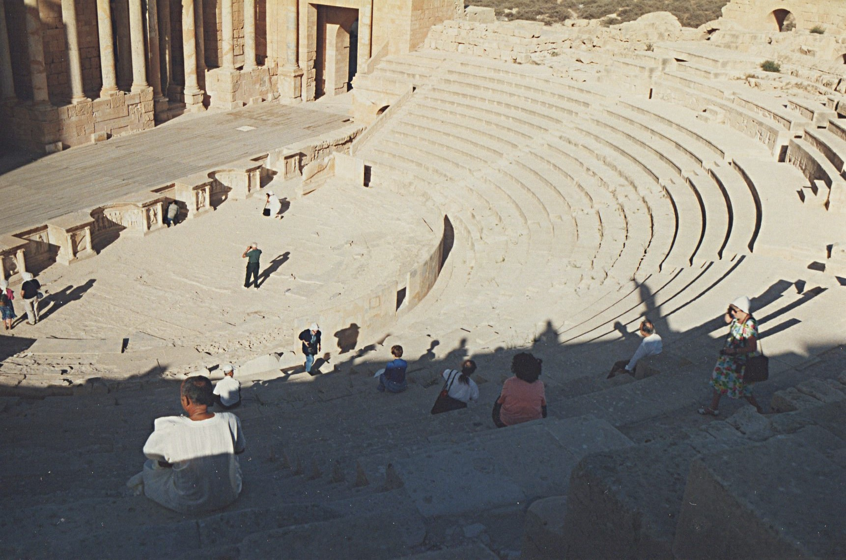 Théâtre de Sabratha (Libye), orchestre et cavea restaurée sur deux niveaux de gradins